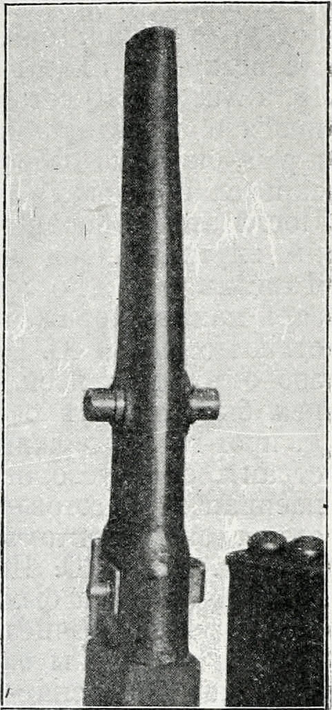 Это изображение было использовано для иллюстрирования статьи «Дисковые снаряды (сплюснутые)» опубликованной в девятом томе «Военной энциклопедии», который был издан книгоиздательским товариществом И. Д. Сытина в 1912 году в столице Российской империи городе Санкт-Петербурге. Артиллерийское орудие для стельбы дисковыми снарядами с гладким элиптическим каналом делается по длине слегка, изогнутым в виде дуги круга и при стрельбе расположено выпуклостью кверху, так чтобы сплюснутый снаряд, имеющий вид хлебца (на фотографии справа) при выстреле центробежной силой прижимается к верх. производящей дугообраз. канала, и катится по ней, получая желаемое вращение. Подобное орудие, изготовленное в России и хранящееся в Артиллерийском историческом музее Петербурга, испытывалось под руководством профессора балистики Н. В. Маиевского.